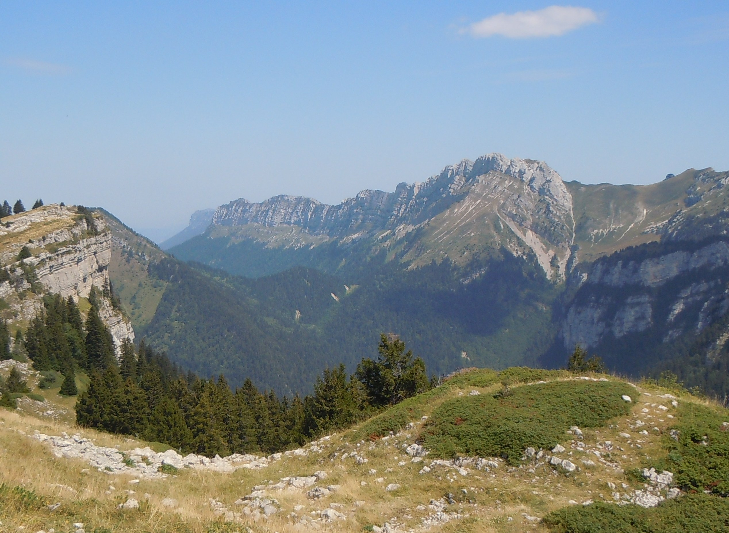 Roc d'Arguille et Lances de Malissard depuis le Pravouta